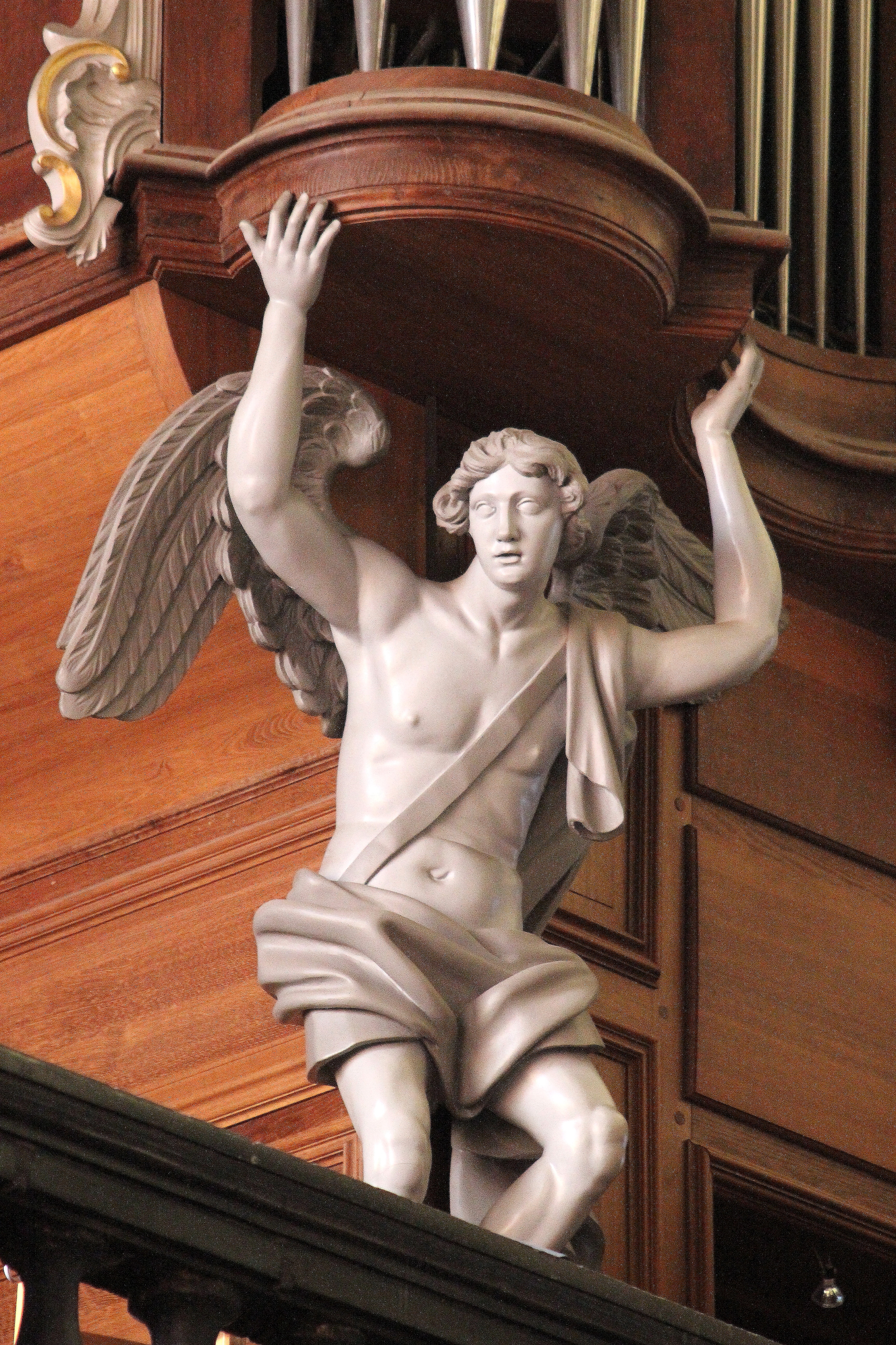 Église Notre-Dame du Sablon, Bruxelles, Belgique. Détail du buffet restauré de l'orgue de Goynaut